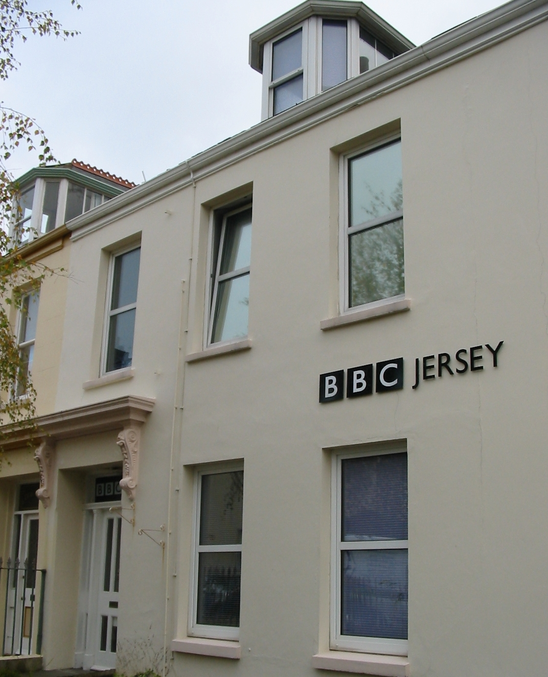 Nrf: Jèrri Nrf: BBC Jèrri